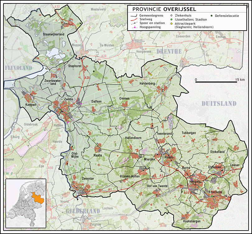 Provincie Overijssel, indeling van gemeenten (2009) en impressie van het landschap. Jan-Willem van Aalst, samengesteld uit publiek beschikbare geo-data: Referentie-ondergrond (kustlijn, steden, wegen) gerasterd uit de OpenStreet Map OSM. ( Inhoud is beschikbaar onder de Creative Commons Attribution-ShareAlike 3.0 license. Referentie-ondergrond op water bewerkt vanuit Gebruik is vrij met bronvermelding NLR en ESA. Vectorgrenzen van gemeenten en regio's vrij ter beschikking gesteld met dank aan cartografen van brandweerregio's Hollands-Midden en IJssel-Vecht; gerasterd in Photoshop. BRZO locaties op basis van de provinciale risicokaart, Defensie locaties op basis van de lijst op Overige kenmerken op de kaart: eigen tekenwerk van Jan-Willem van Aalst, op basis van gerasterde gemeentegrenzen.